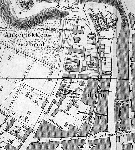 Kart over Fjerdingen, Kristiania, 1861.